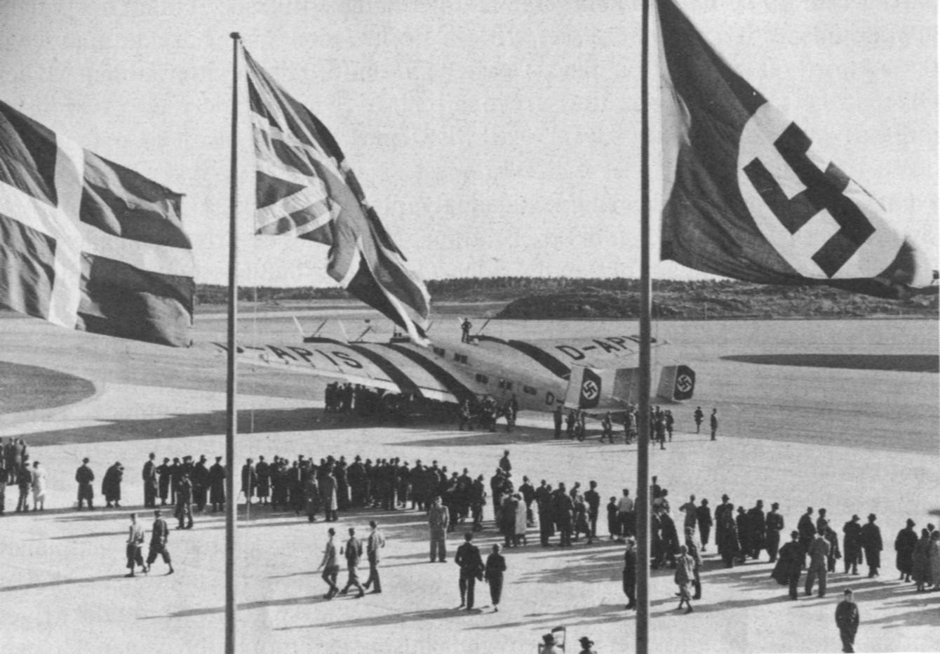 Invigning av Bromma Flygplats, världens största landflygplan, en Junkers G-38 visades upp.